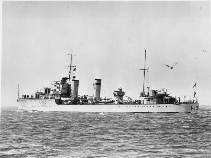 British destroyer HMS DELIGHT underway.